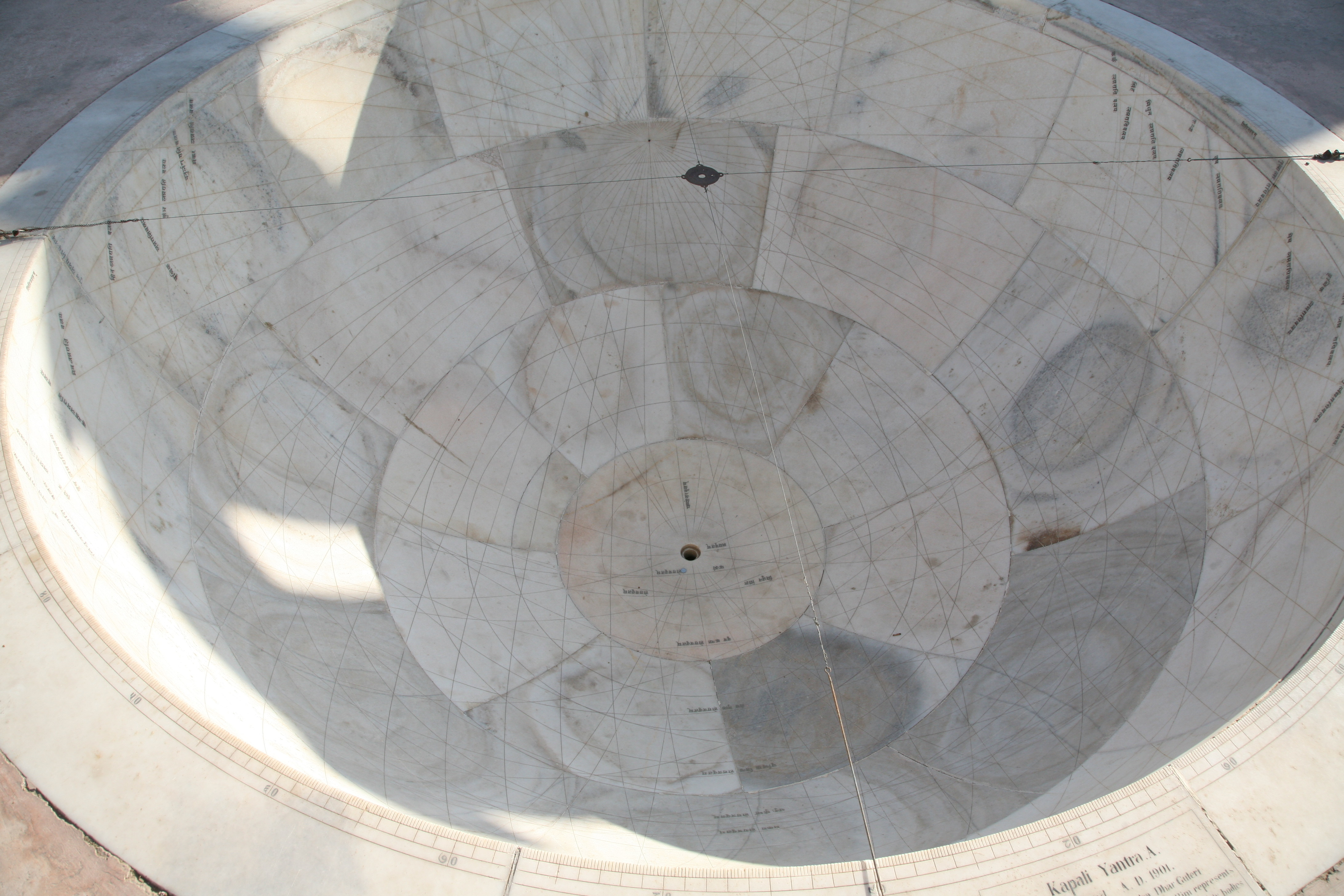 From Jantar Mantar in Jaipur.